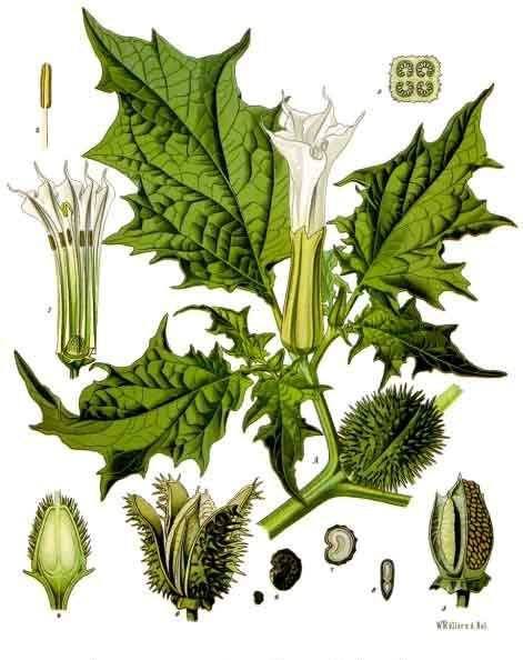 Stechapfel. A blühender und fruchtender Stengel in natürl. Grösse; 1 Blüthe von einem Theil der Krone befreit, desgl.; 2 Staubgefäss, vergrössert; 3 unterer Theil des Fruchtknotens im Querschnitt, desgl.; 4 derselbe im Längsschnitt, desgl.; 5 von der Kapsel befreite Frucht, natürl. Grösse; 6 Samen, natürl. Grösse und vergrössert; 7 derselbe in der Richtung der Breitseite, durchschnitten, desgl.; 8 derselbe in der Richtung der schmalen Seite, durchschnitten desgl.; 9 reife geöffnete Frucht, natürl. Grösse.